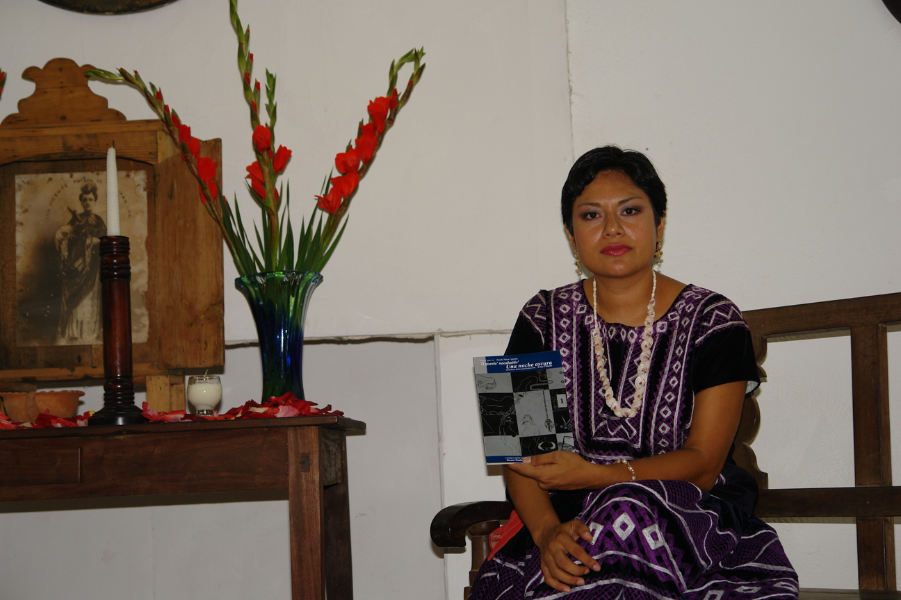 La escritora zapoteca Irma Pineda Santiago (2007)